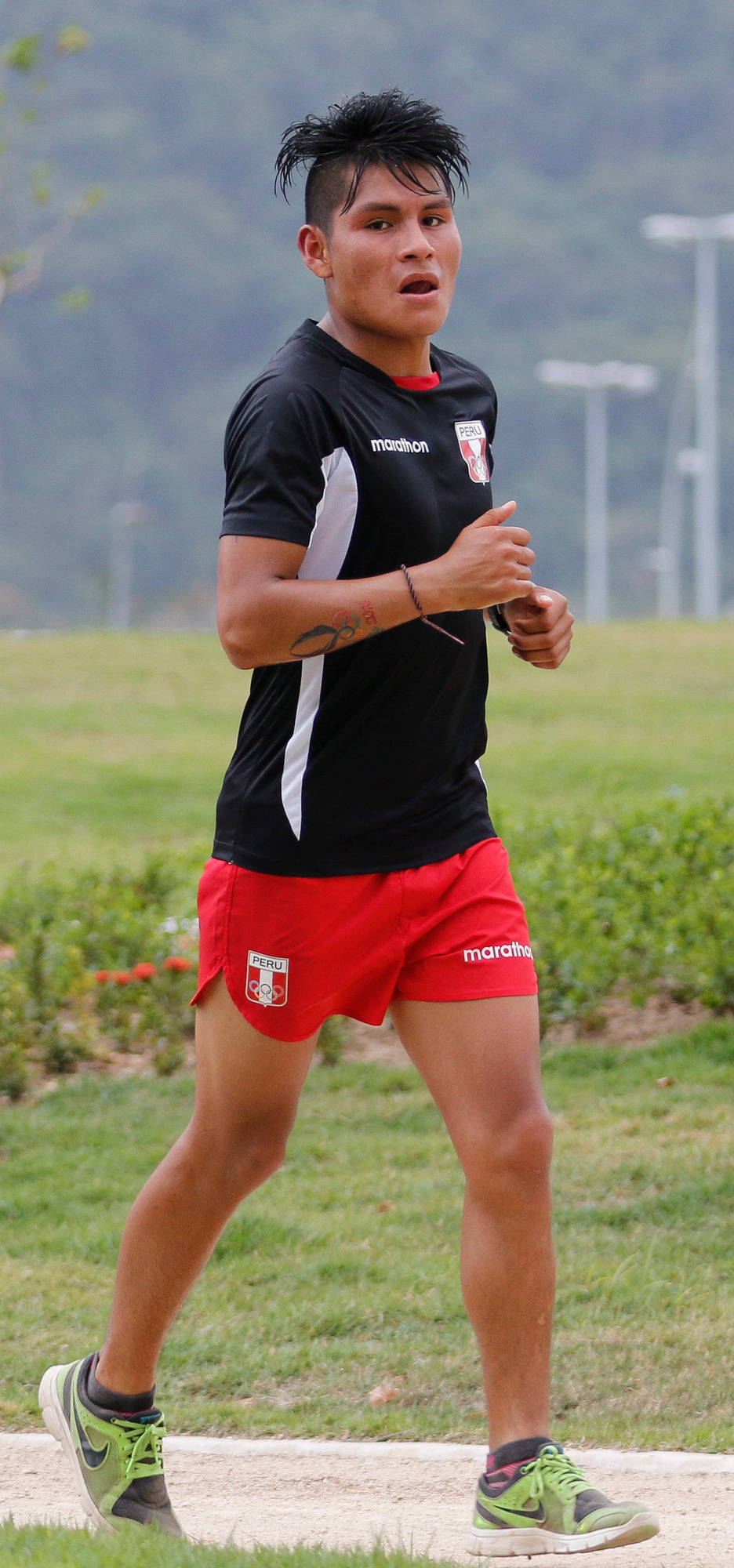 Rio de Janeiro - Atleta peruano corre na rea residencial da Vila Olmpica dos Jogos Rio 2016, onde estão hospedados os atletas.